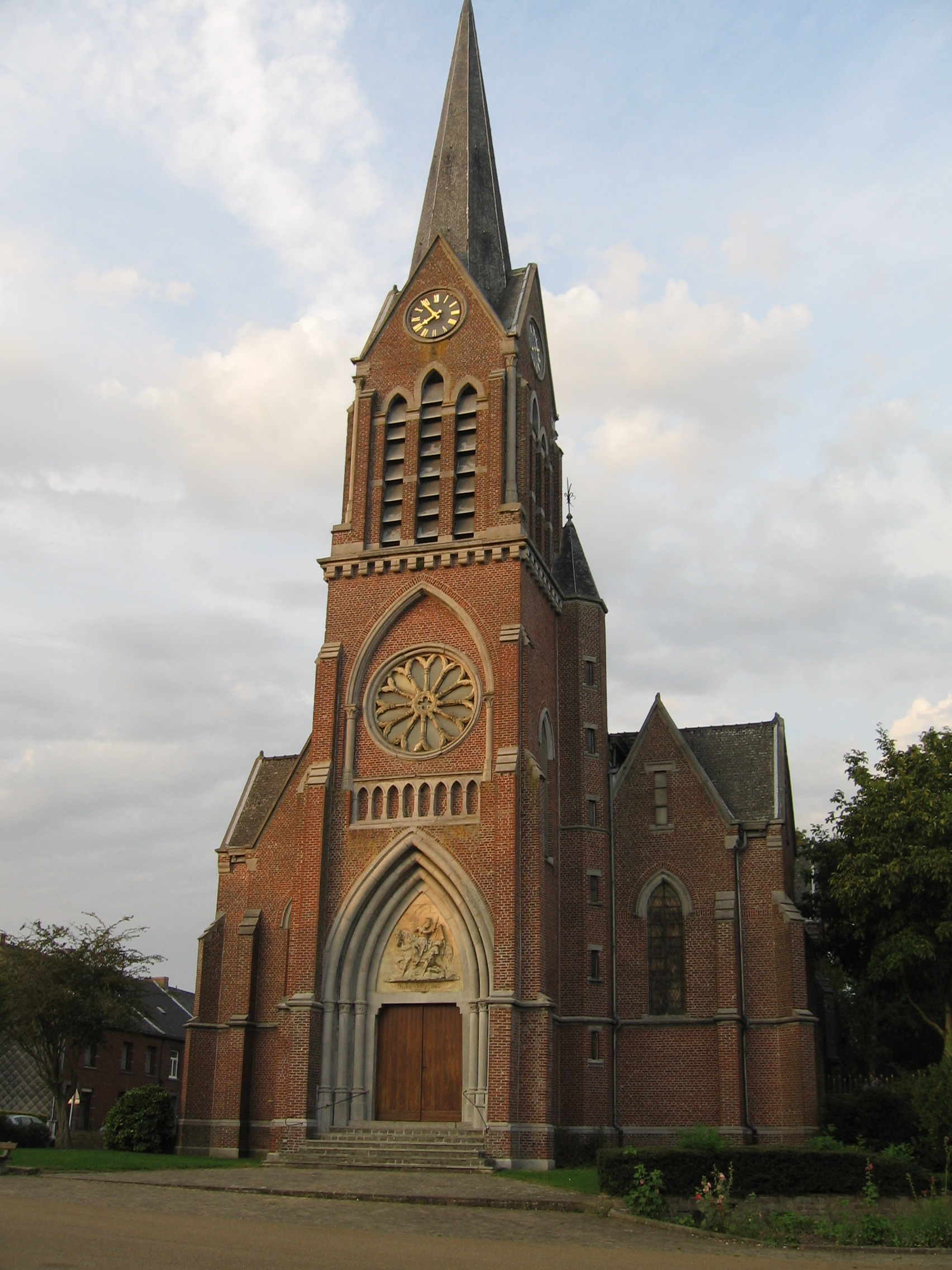 Eglise Saint-Martin (1888) de Villers-Perwin, commune de Les Bons Villers (Belgique).